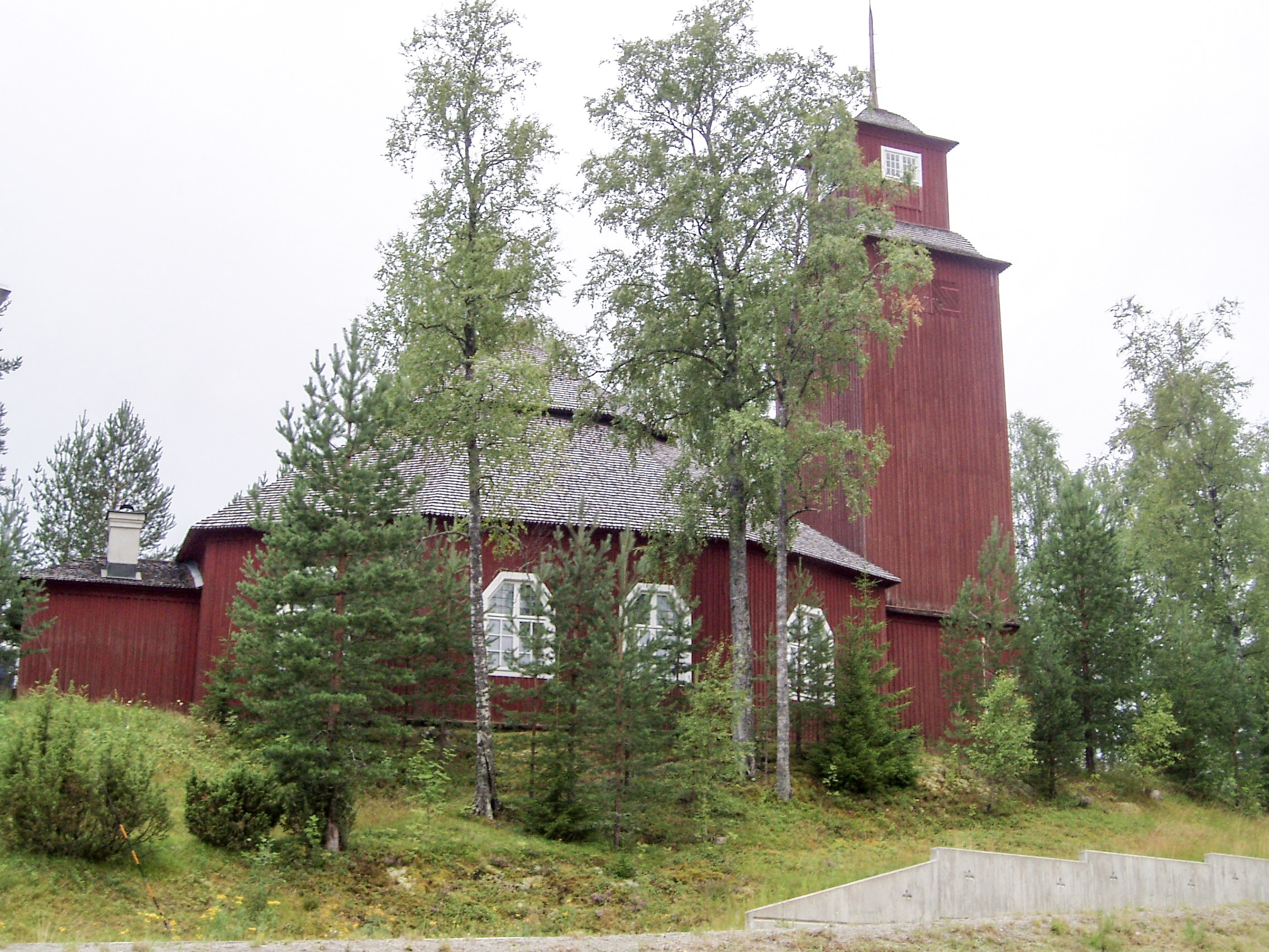 Lagfors kyrka i Ljustorps församling, Medelpad, Sverige